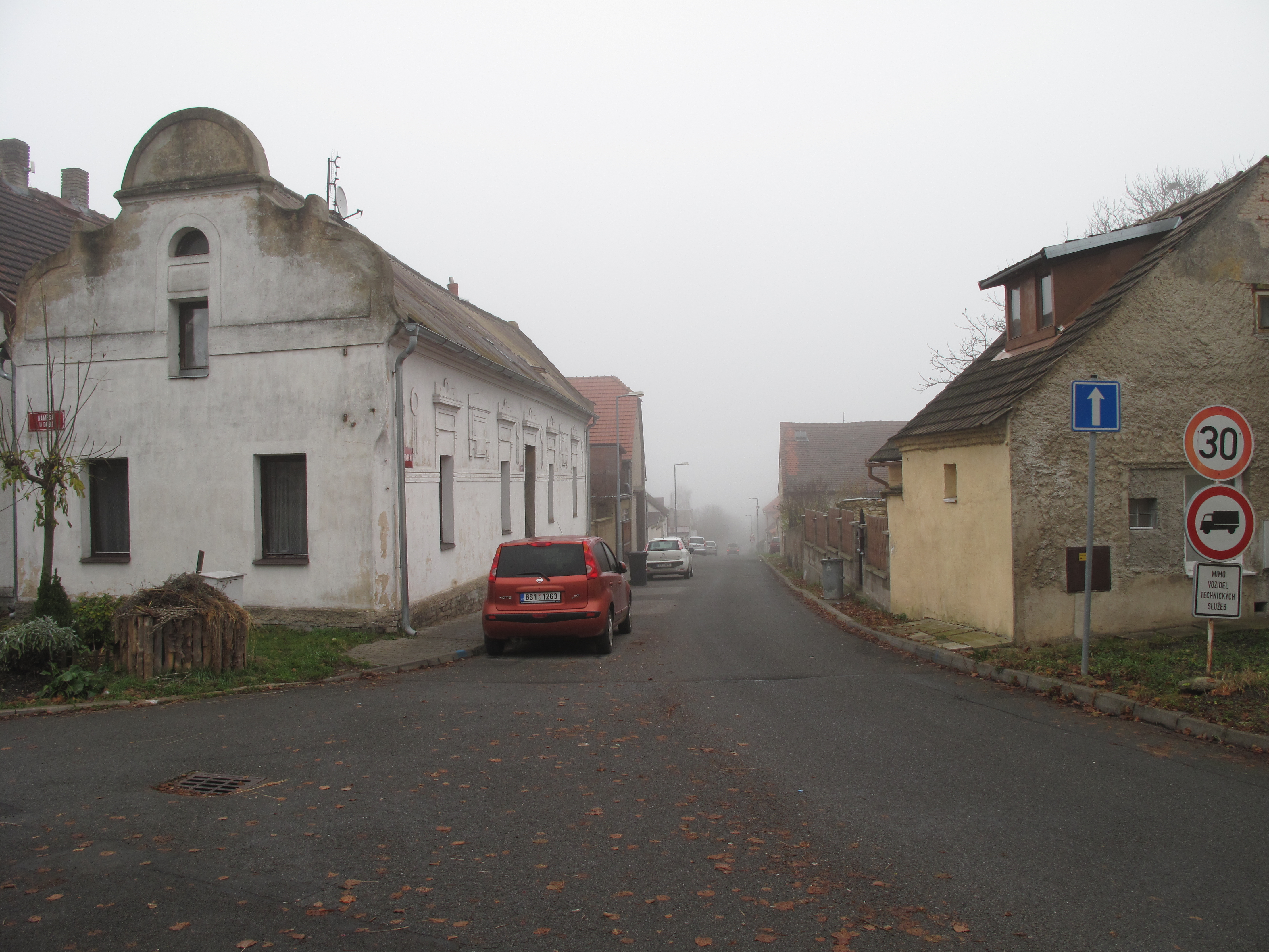 Dům u cesty v Stochově. Okres Kladno, Česká republika.